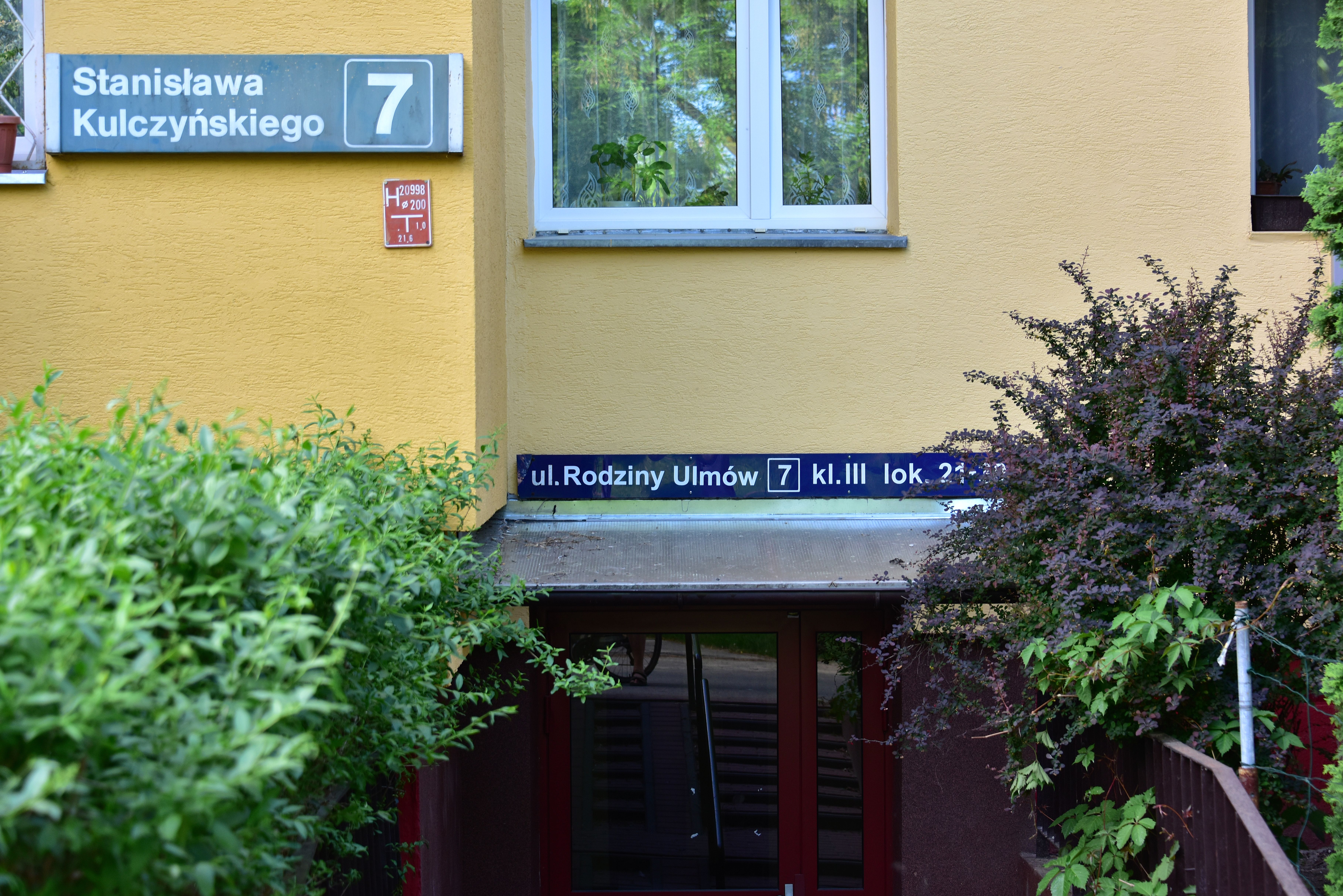 Wejście do budynku mieszkalnego przy ul. Kulczyńskiego w Warszawie